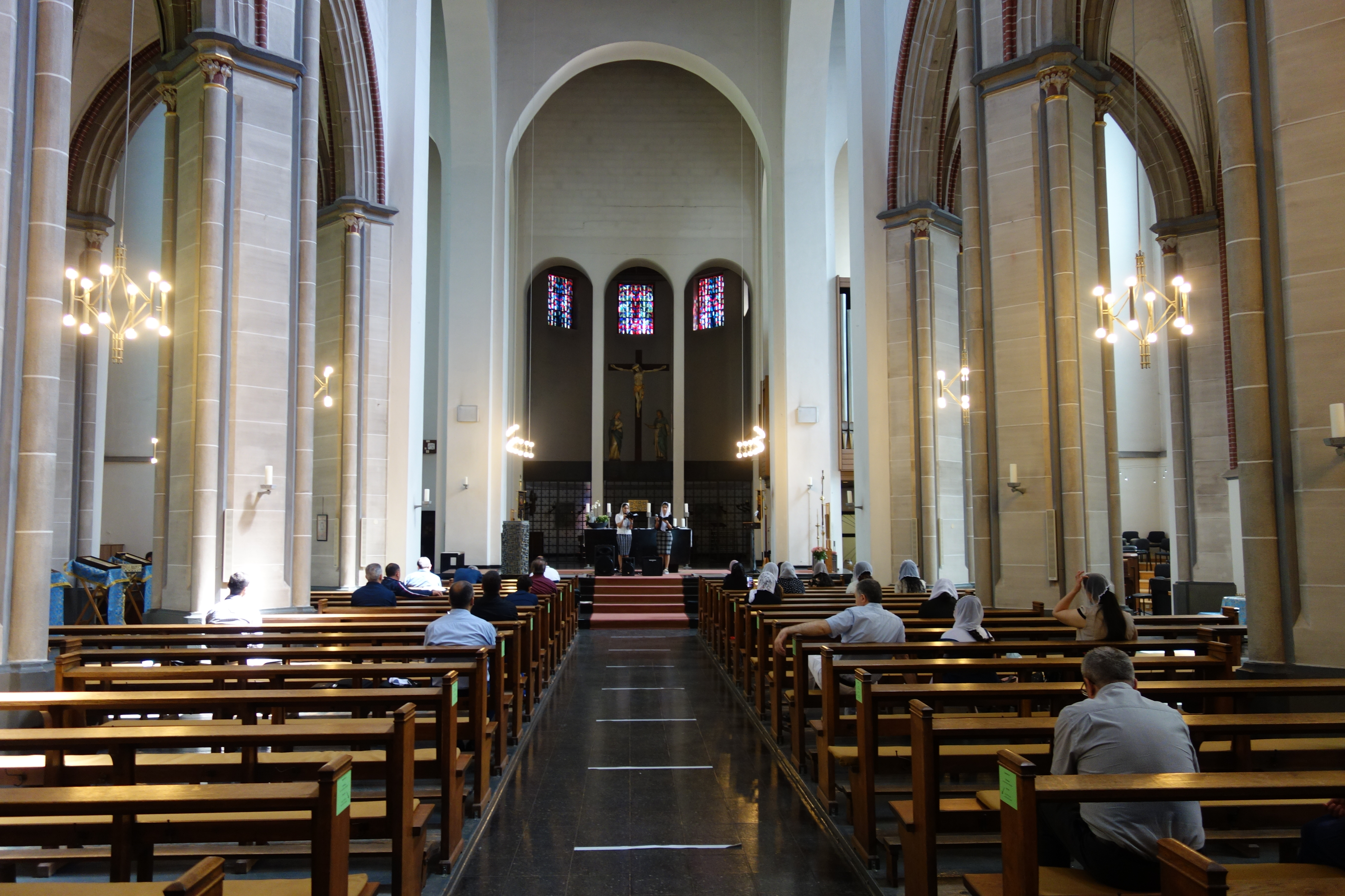 Neugotischer Innenraum der Norbertuskirche in Duisburg-Obermarxloh